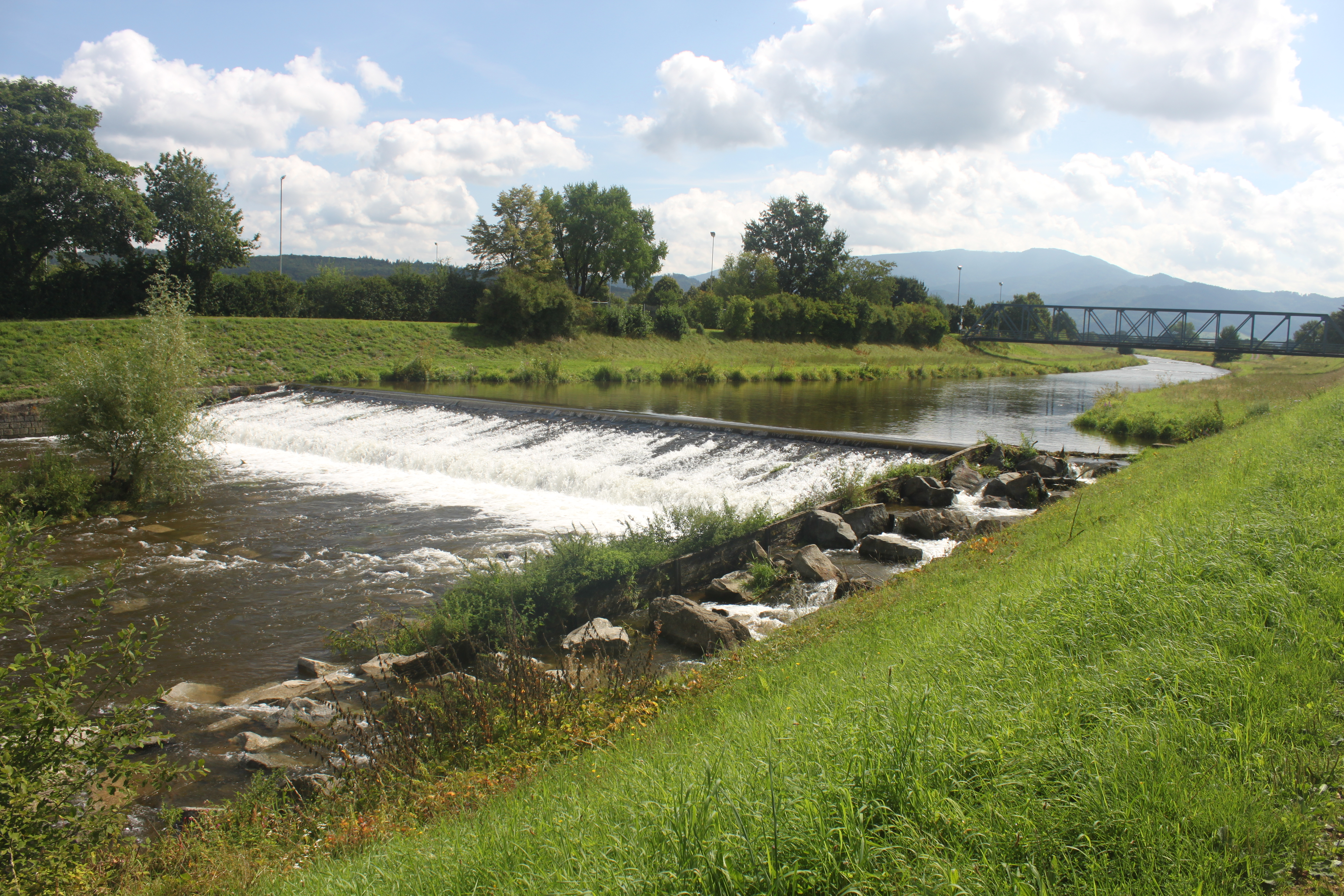 Wassermer Wehr (Elz bei Emmendingen), im Hintergrund die Wiesenbrücke und der Kandel